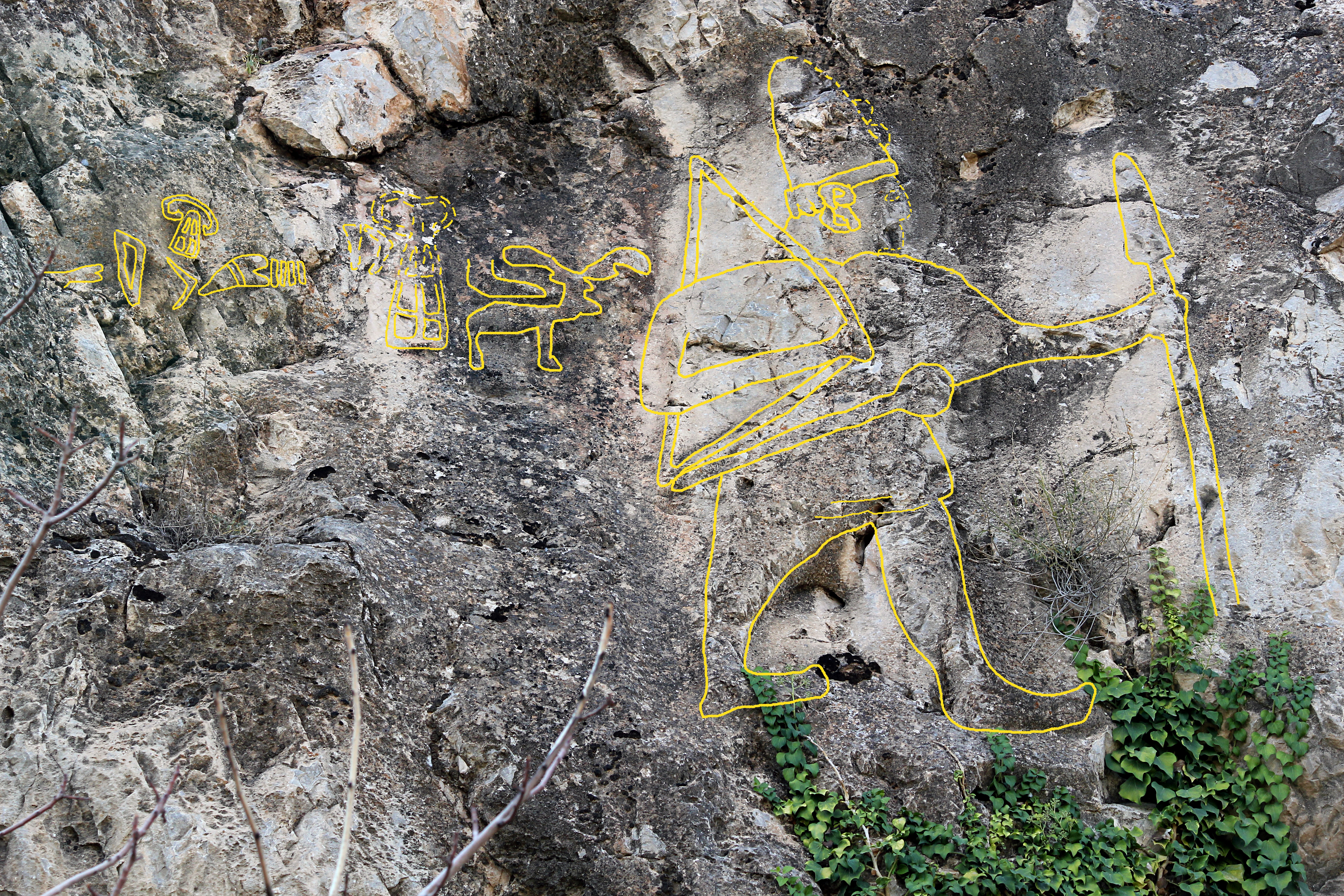 Hethitisches Felsrelief von Hatip bei Konya, Zentraltürkei - mit Umzeichnung